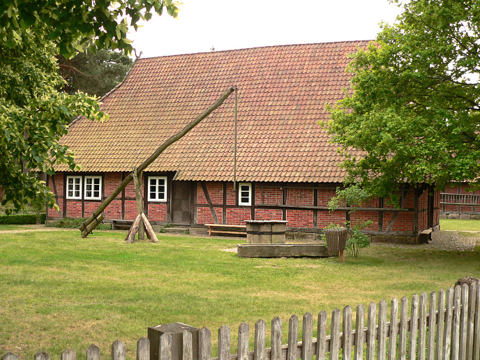 Museumshof Winsen Draw well at the Winsen Farm Museum, Lower Saxony, Germany.